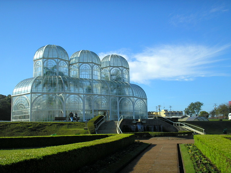 Estufa principal do Jardim Botânico de Curitiba, PR, Sul do Brasil.